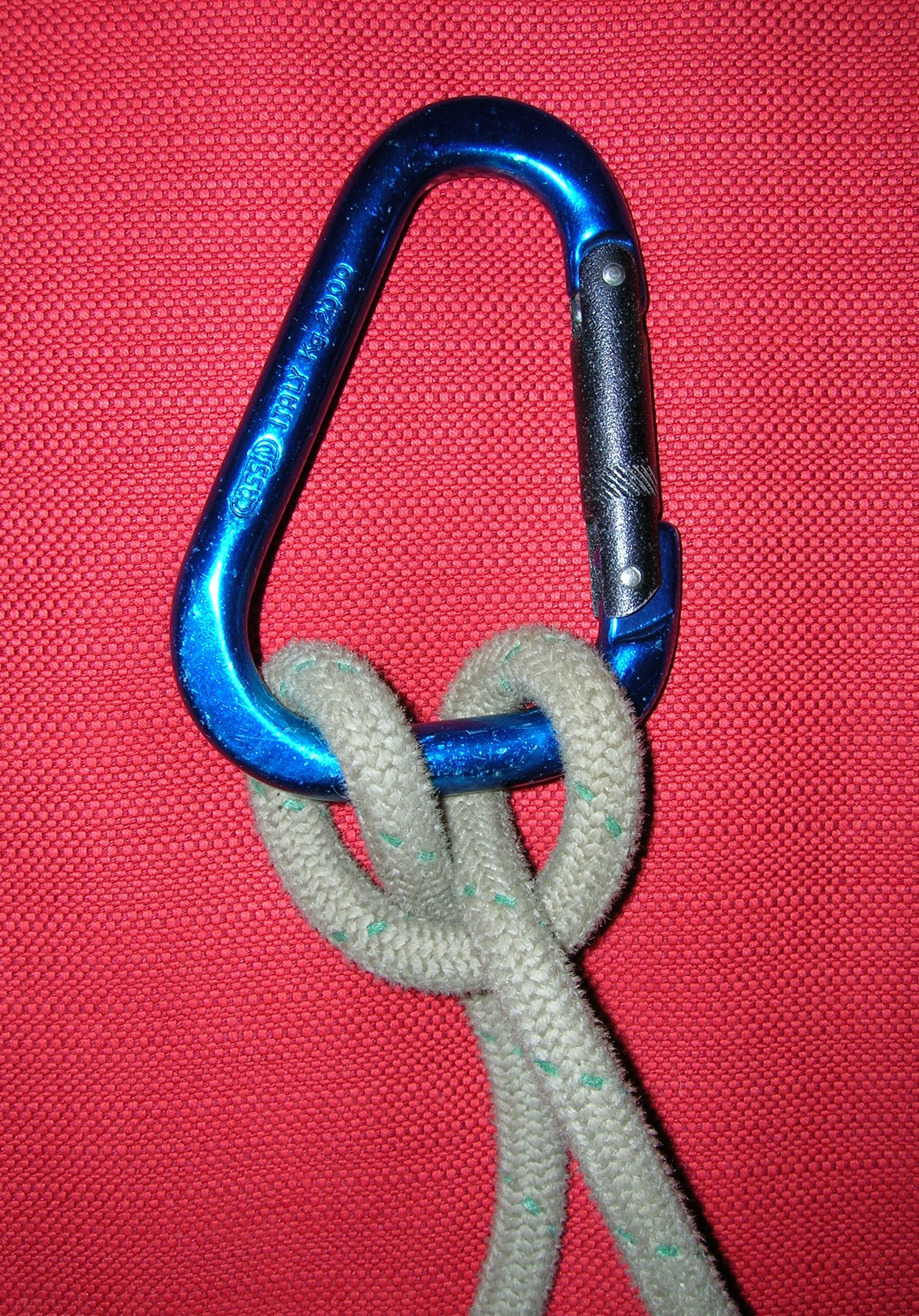 Nodo barcaiolo. Foto mia.